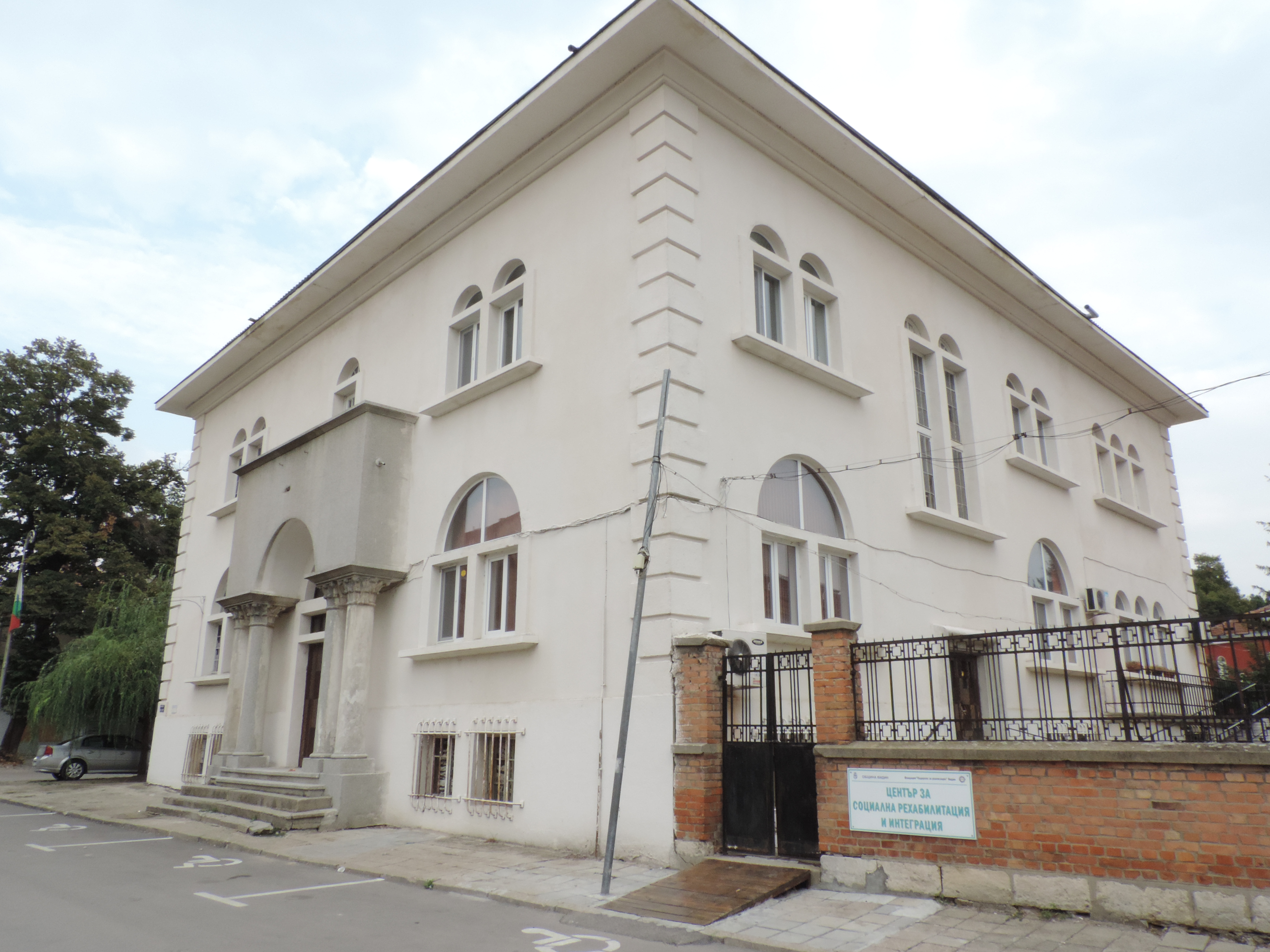 Център за социална рехабилитация и интеграция (бившият Пионерски дом) във Видин, България